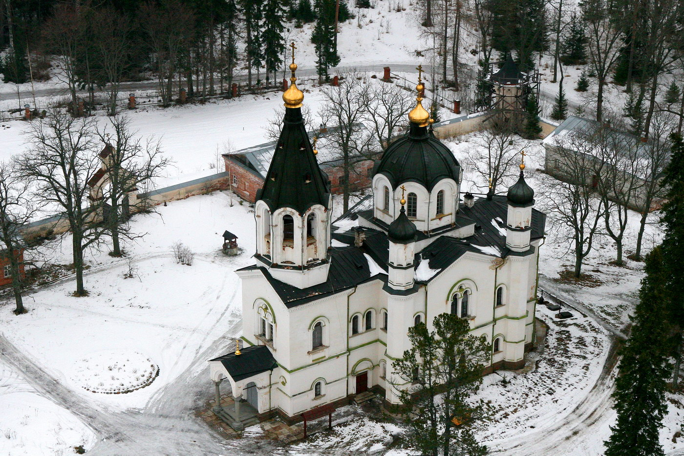 Церковь Всех Святых Всехсвятского скита (Валаамский Спасо-Преображенский монастырь — Валаамский государственный историко-архитектурный и природный музей-заповедник), Республика Карелия, Сортавала, Скитский остров.